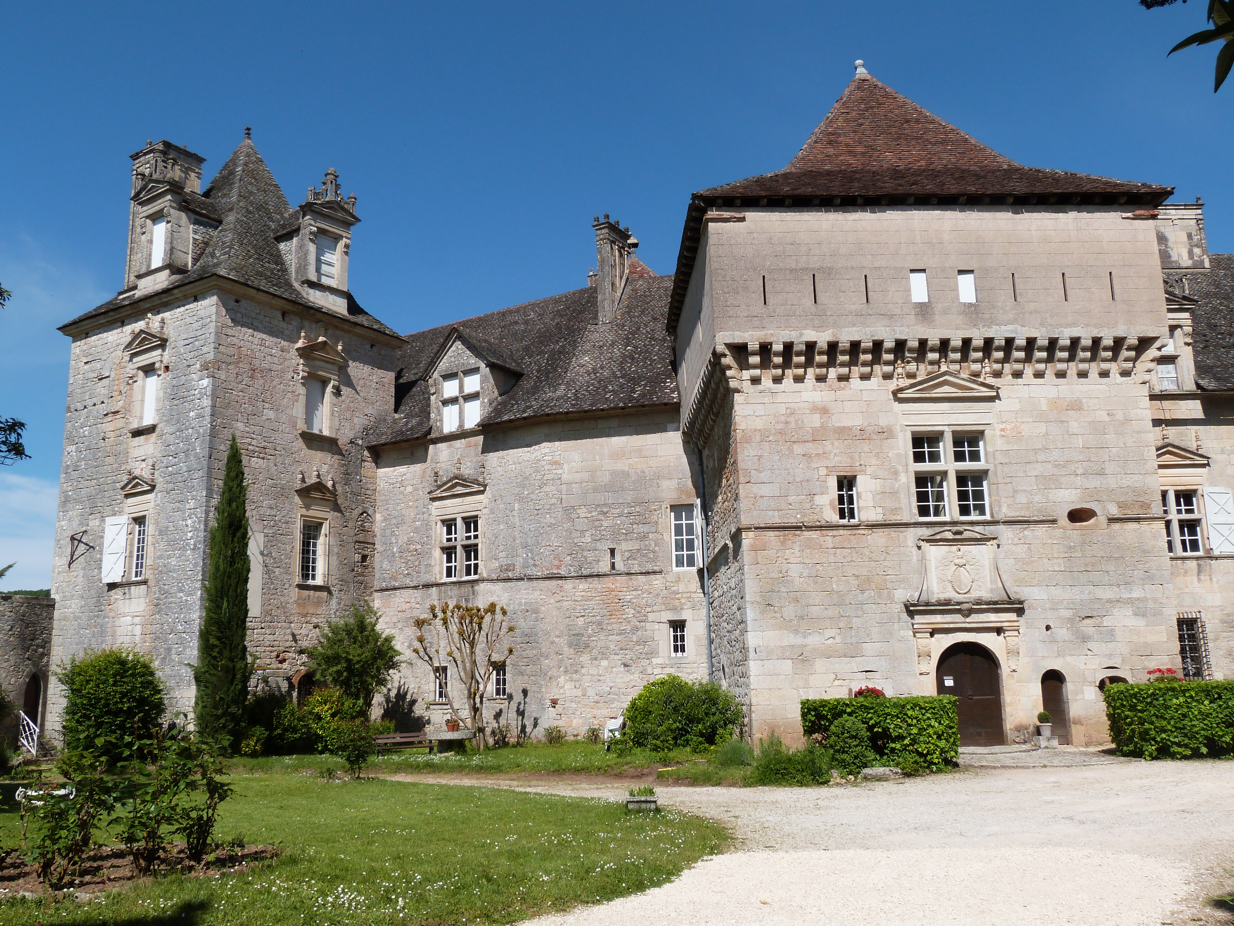 Château de Cénevières (Classé) .